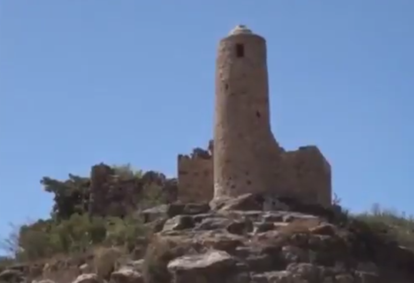 تقع شمال عزلة ذبحان وتعتبر من القرى التي سكنت منذ مئات السنوات وكان اول ساكنيها الشيخ عمر بن محمد قاهر السروري ففيها مناره مسجد قديم اسسهو الشيخ عبدالله عثمان السروري عام 1870م كما توجد عين للمياه تحت المناره وتسمى بالكونيه وهو اقدم جامع بمنطقة ذبحان ويتجازو عمر هذا المسجد 230 سنه ففيها ديوان للمولد والسكن وديوان الهجره ويدرس فيها علوم القرأن تم شراء جميع الاراضي المحيطه في هذه المنطقه من قبل الشيخ احمد محمد العمري المقيم في قرية السلم عزلة ذبحان